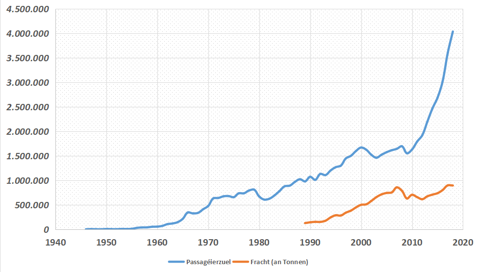 Passagéierzuel an Frachtopkommes vun de Joren 1946 bis 2018 um Fluchhafe Lëtzebuerg.